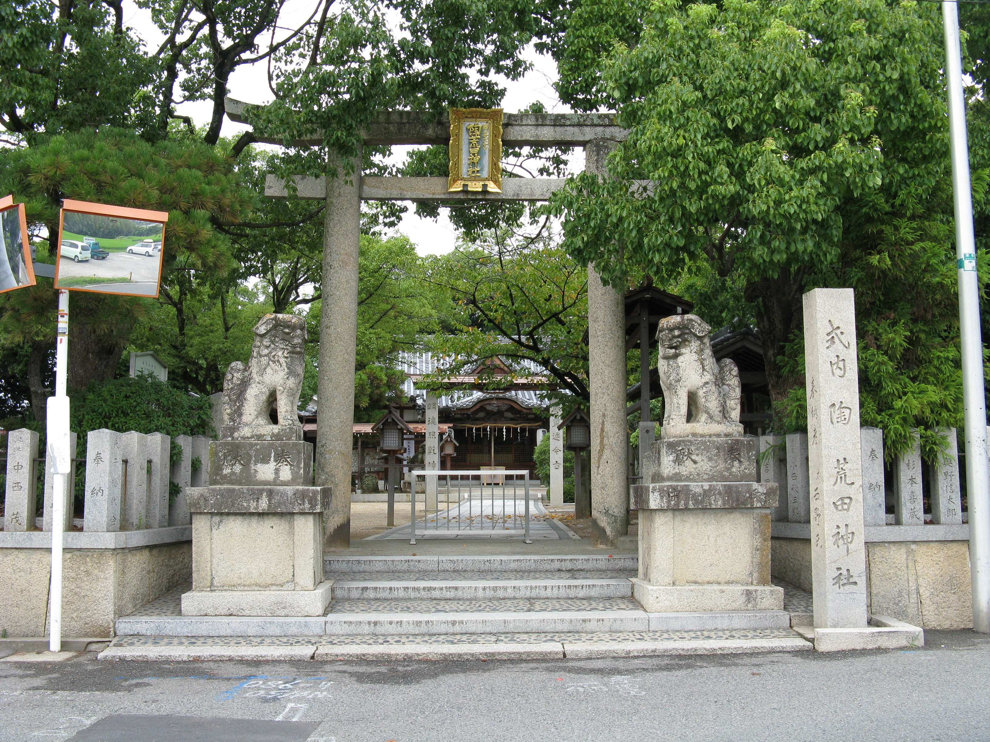 陶荒田神社